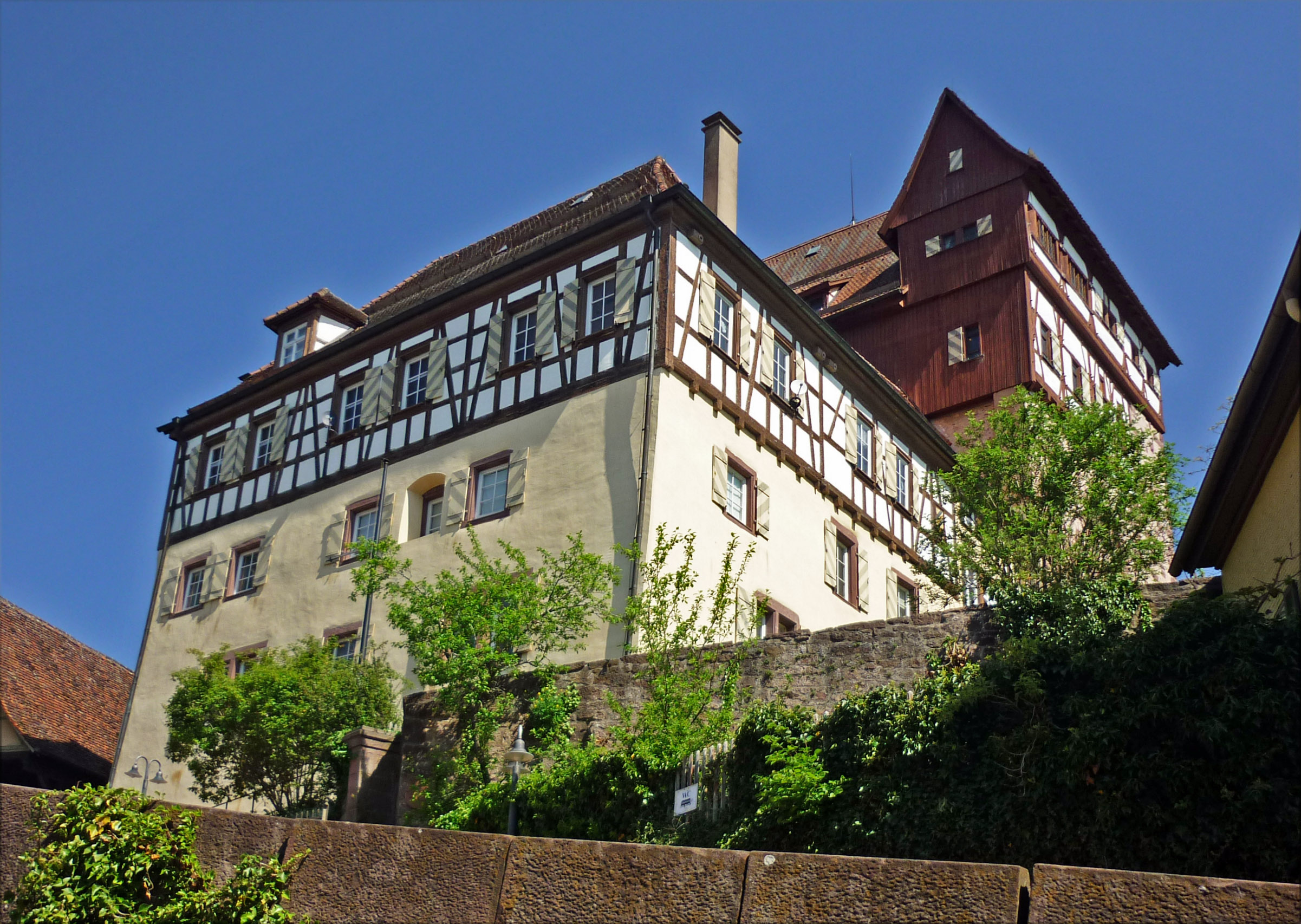 Altensteiger Schloss in Altensteig im Lkr. Calw (Württemberg)